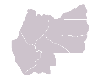 Mapa de la provincia Andres Ibáñez, Bolivia.